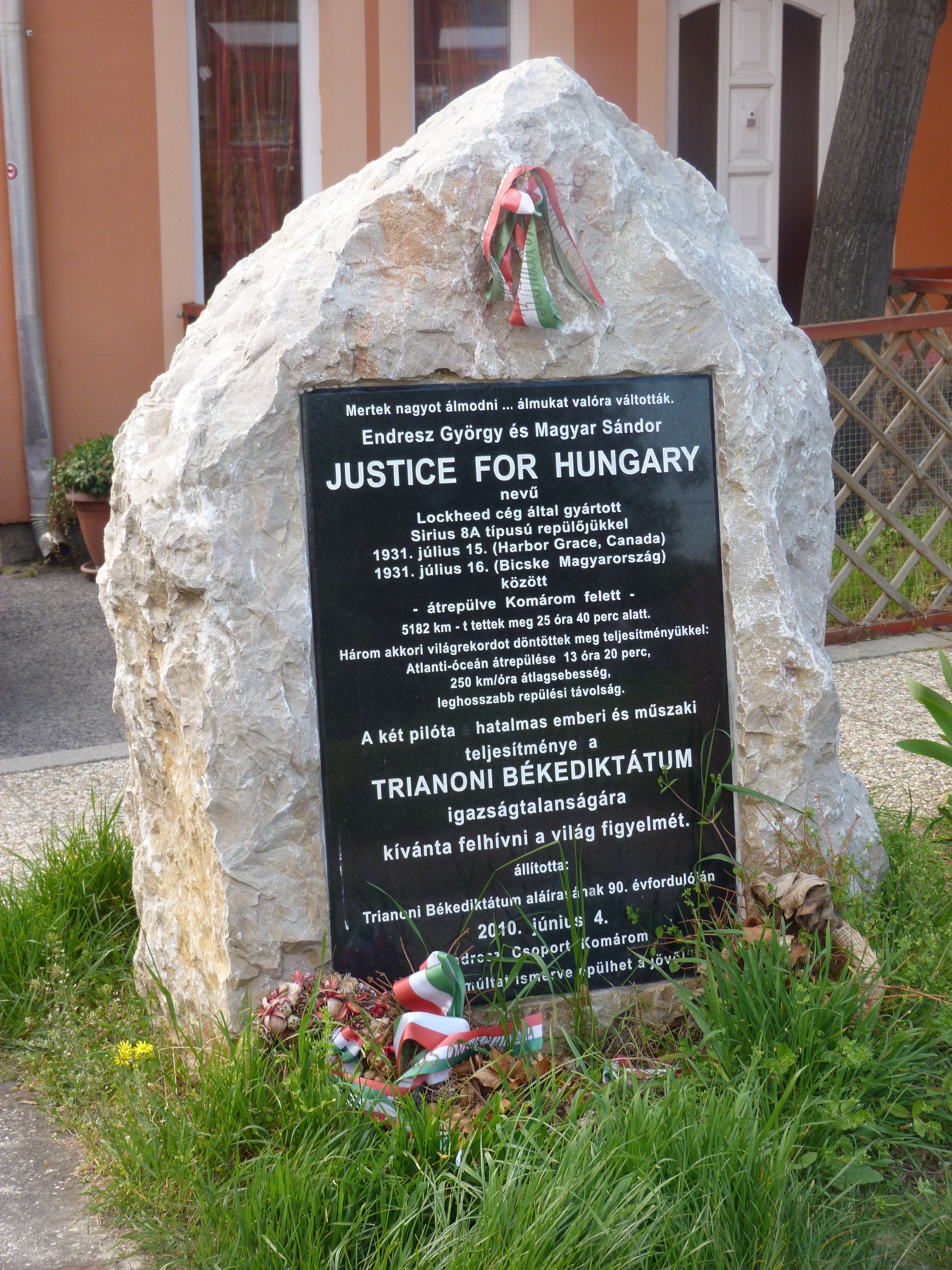 A felvétel 2014. március 31 -én hétfőn készült Komáromban. Justice for Hungary. ©© Derzsi Elekes Andor, Budapest, 2014, You are authorised to use these photos and vids under Creative Commons – even for commercial, for profit purposes. Photos must be attributed to Derzsi Elekes Andor. All of the photos and vids in the Metapolisz DVD line are under Creative Commons and can be used even for commercial – for profit – purposes. Recommended Citation Derzsi Elekes Andor: Metapolisz DVD line